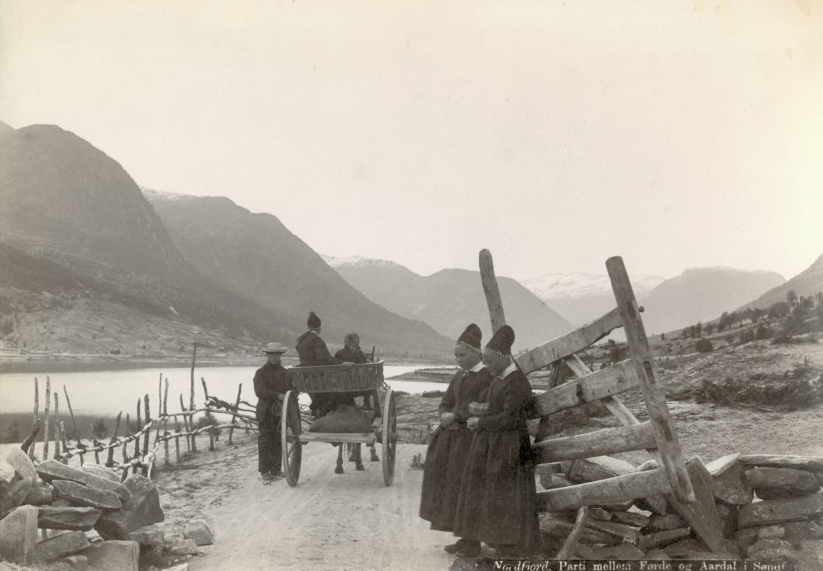 Ålhus i Ålhus, Sogn og Fjordane Nordfjord, Parti mellom Førde og Aardal. Lindahl? This image on crowdsourcing geotagging platform Fotodugnad